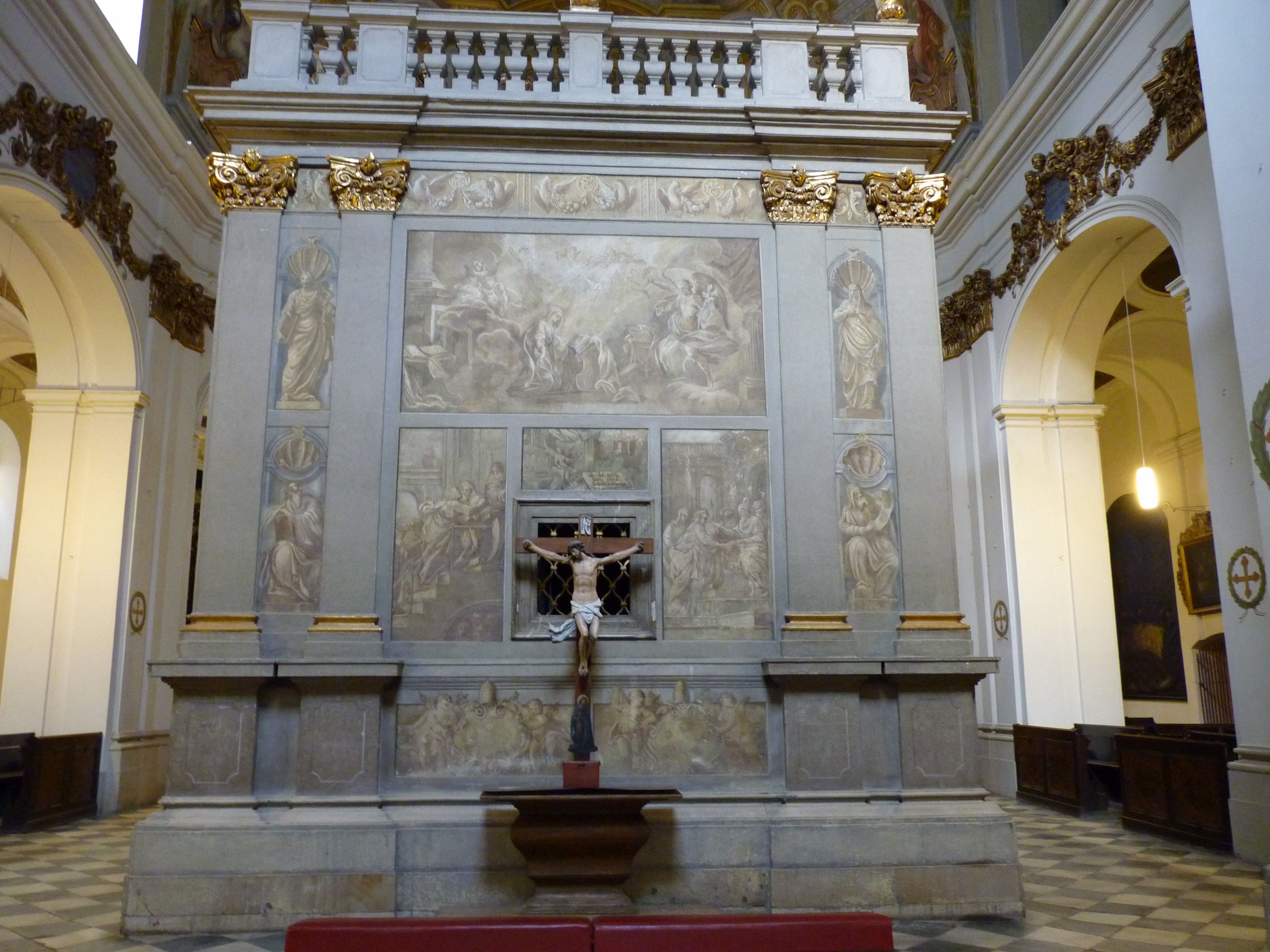 Klášter minoritů, Brno